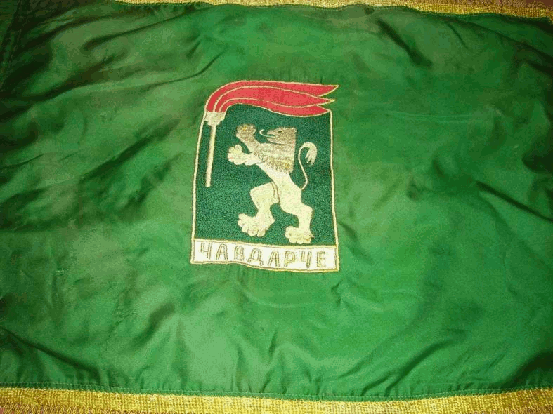 Флаг на чавдарска чета - лицева страна.